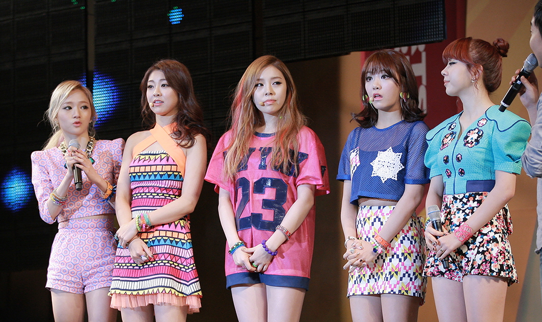 나쁜여자 레이디스코드 (LADIES' CODE) 다문화 가정 돕기 희망콘서트 용산 아이파크몰 이벤트광장